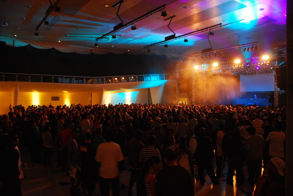 Indie Hip-Hop - Sesc Santo André - SP - Brasil.